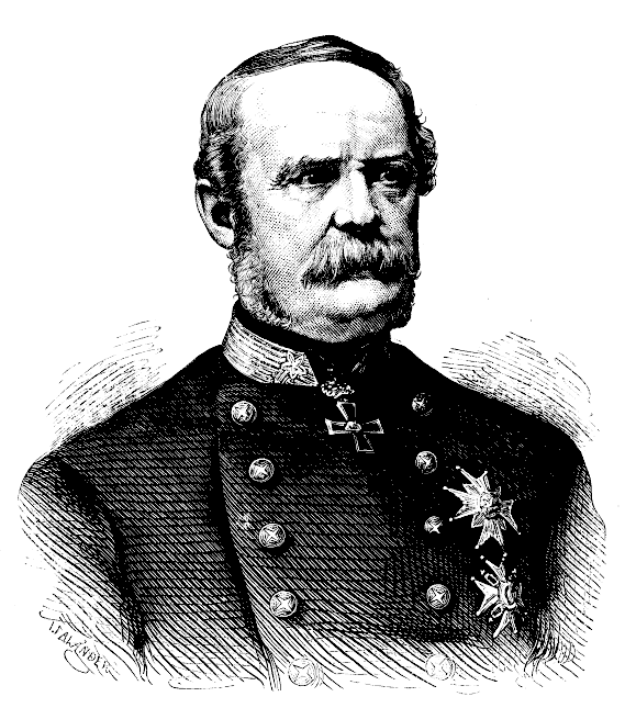 Eric af Klint (1811-1868)